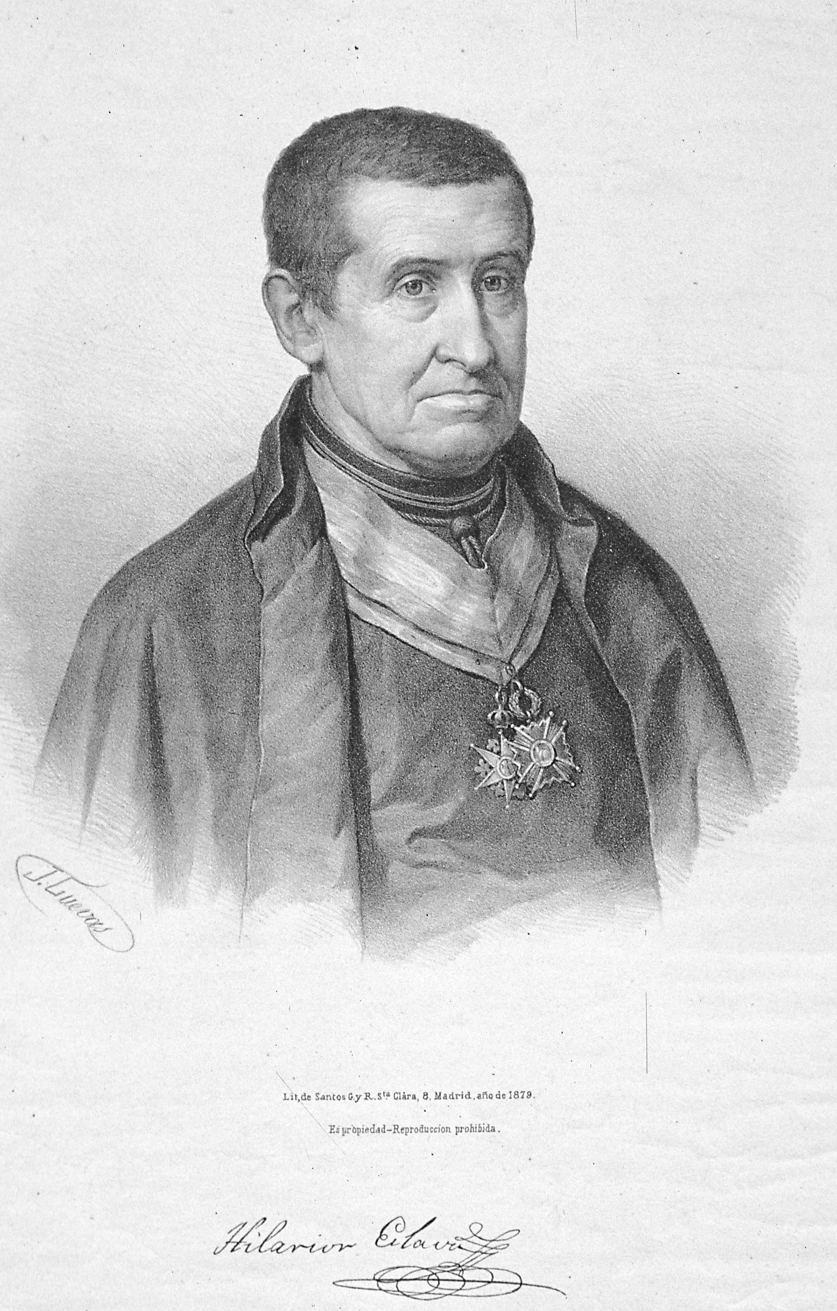 Retrato de Hilarión Eslava/Compositor y musicólogo español del siglo XIX